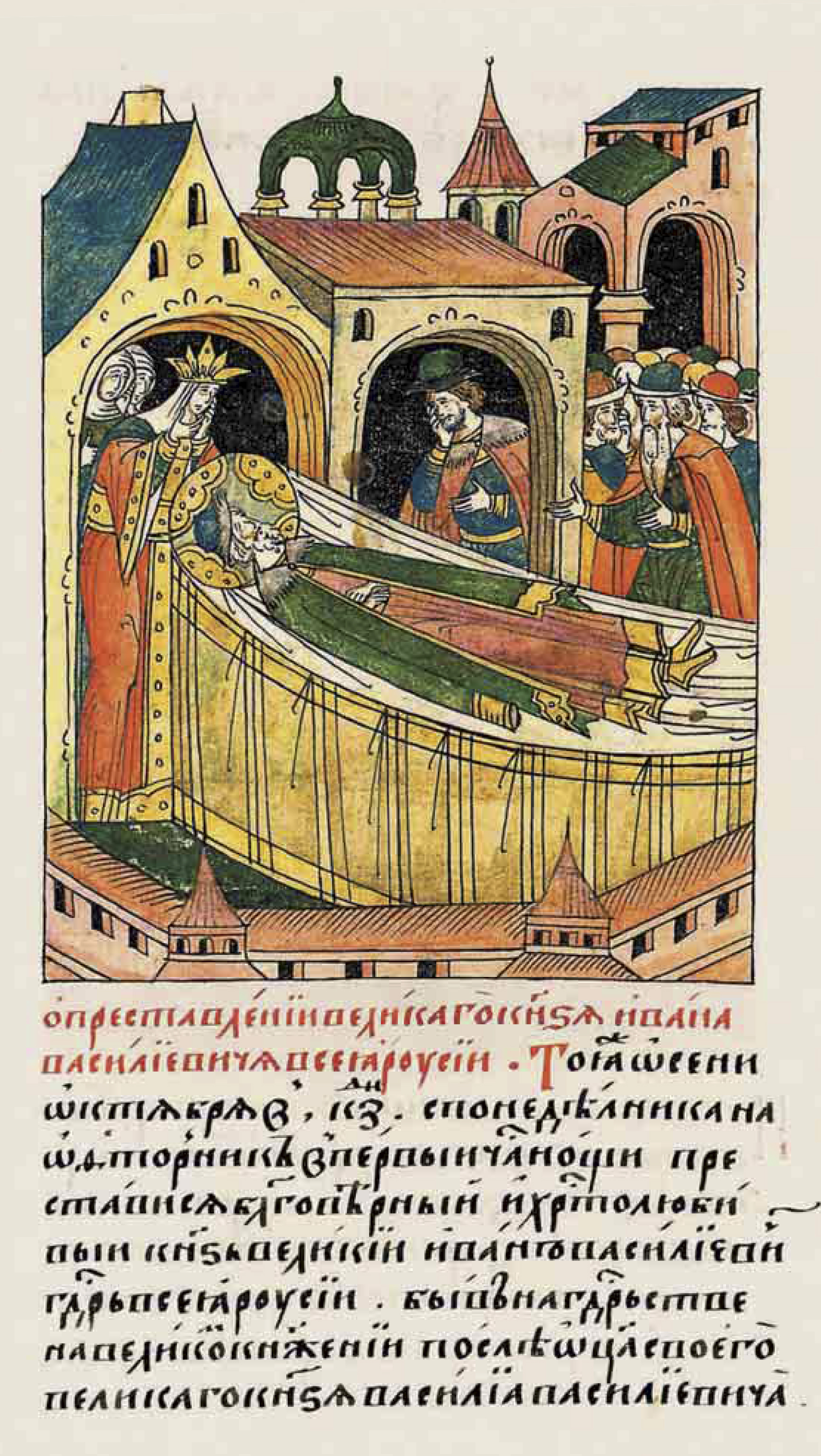 О кончине велико- го князя Ивана Ва- сильевича всея Руси. В ту же осень октября в 27 день, с поне- дельника на вторник, в 1 часу ночи, скончал- ся благоверный и хри- столюбивый князь великий Иван Васи- льевич, государь всея Руси; пробыл он на го- сударстве, на великом княжении после своего отца великого князя Василия Васильевича [43 года и 7 месяцев. А всего ему было 66 лет и 9 месяцев. ]